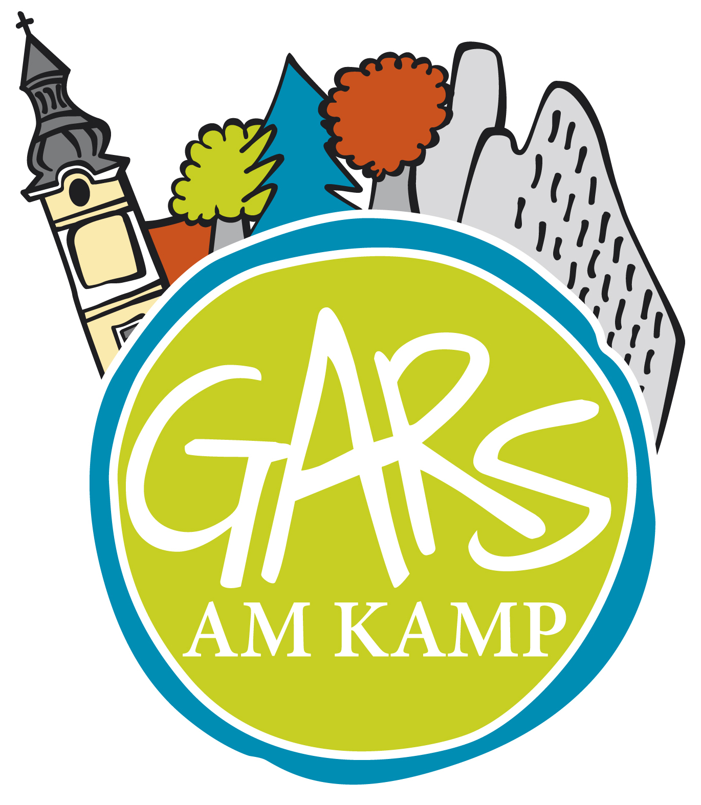 Logo der Marktgemeinde Gars am Kamp ohne Slogan